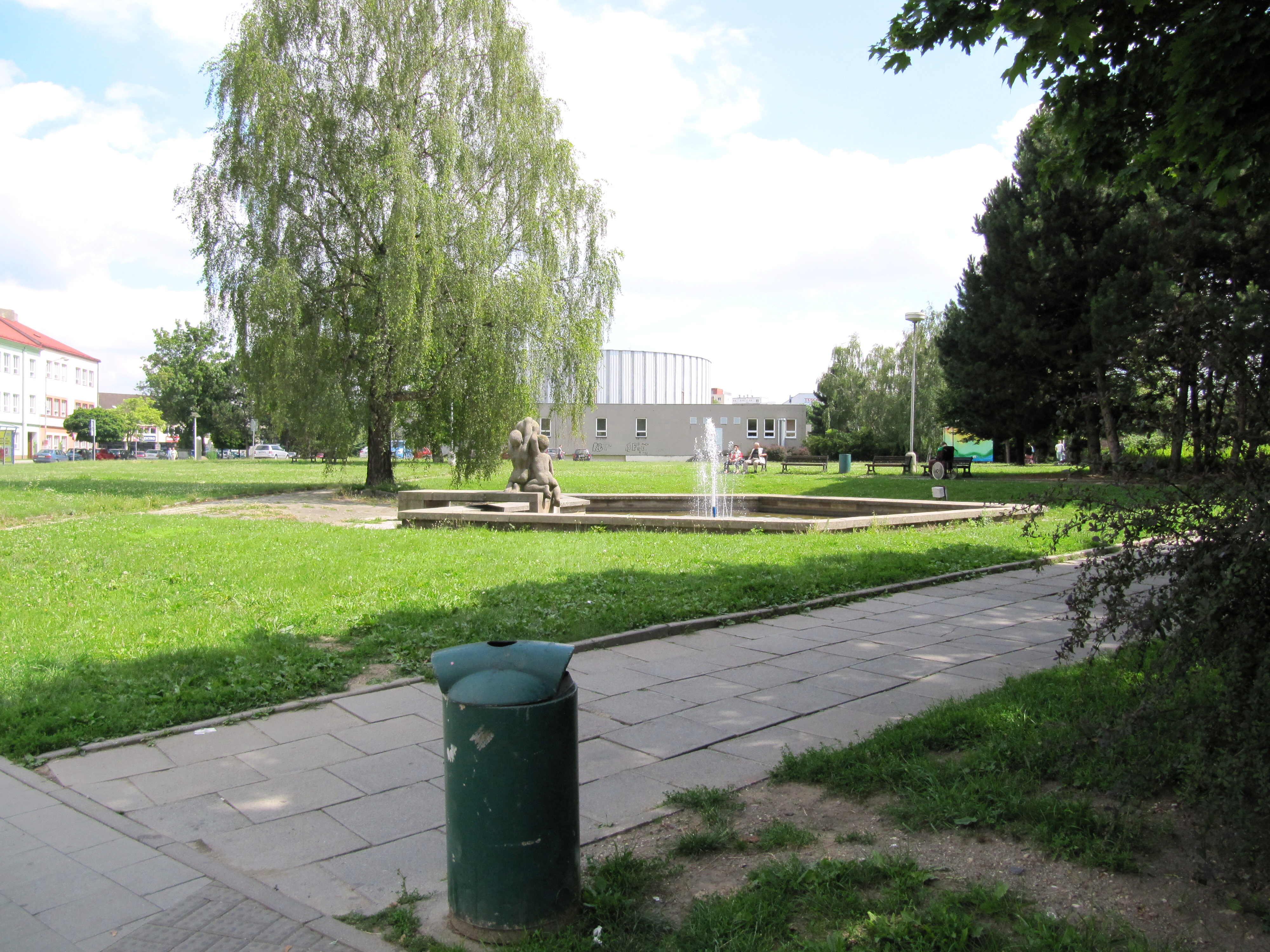 Přerov